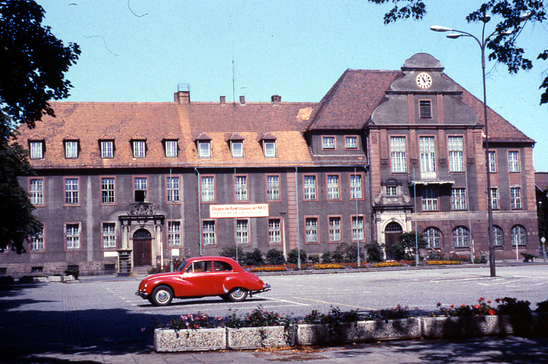 Rathaus und Marktplatz in Weißwasser/Oberlausitz zu DDR-Zeiten, Schild mit Parole "Gegen die Raketenpläne der NATO"